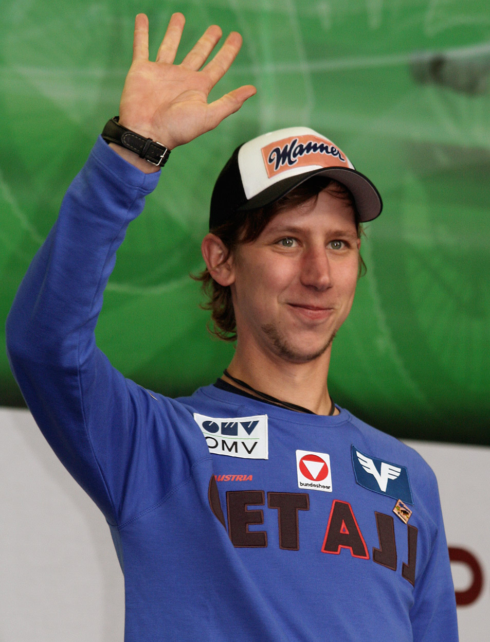 Martin Koch am Tag des Sports 2009 auf dem Heldenplatz in Wien